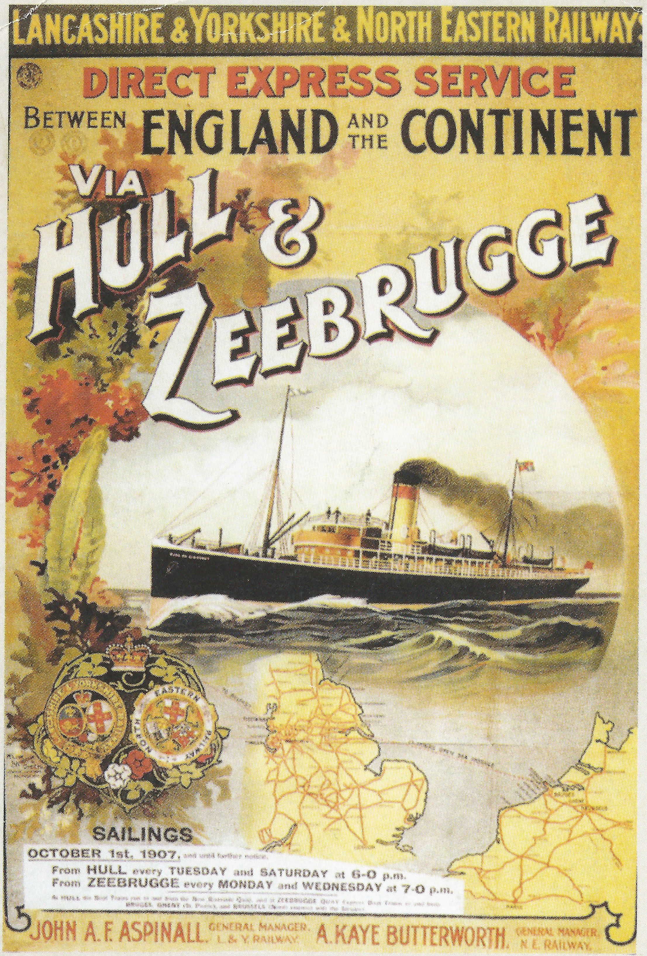 Een oude poster herdrukt op een briefkaart. De veerdienst in 1907 tussen Hull en Zeebrugge. Zeebrugge haven is pas in 1907 geopend, zo dit is de start van de veerdienst.